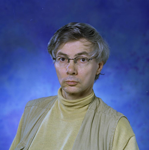 De Nederlandse journalist Emerson Vermaat